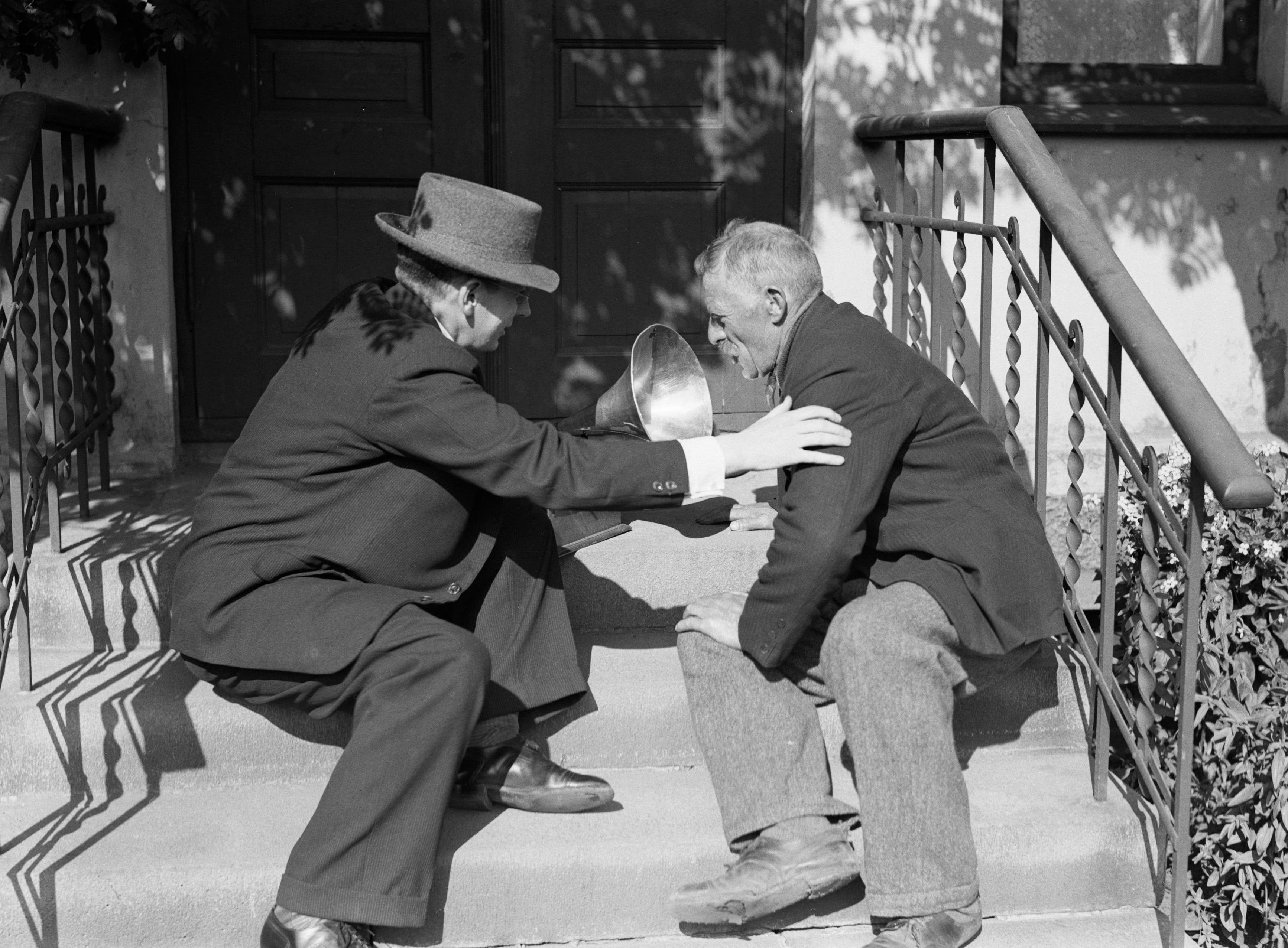 Collectie / Archief : Fotocollectie Van de Poll Reportage / Serie : IJsland Beschrijving : De musikoloog Jón Leifs legt oude volksliedjes vast. Een oudere IJslandse man zal een liedje voor de hoorn van Leifs' opnameapparaat gaan zingen Datum : 1934 Locatie : IJsland Trefwoorden : muziek, muziekopnamen, trappen, volkscultuur, zangers Persoonsnaam : Leifs, Jon Fotograaf : Poll, Willem van de Auteursrechthebbende : Nationaal Archief Materiaalsoort : Glasnegatief Nummer archiefinventaris : bekijk toegang 2.24.14.02 Bestanddeelnummer : 190-0304